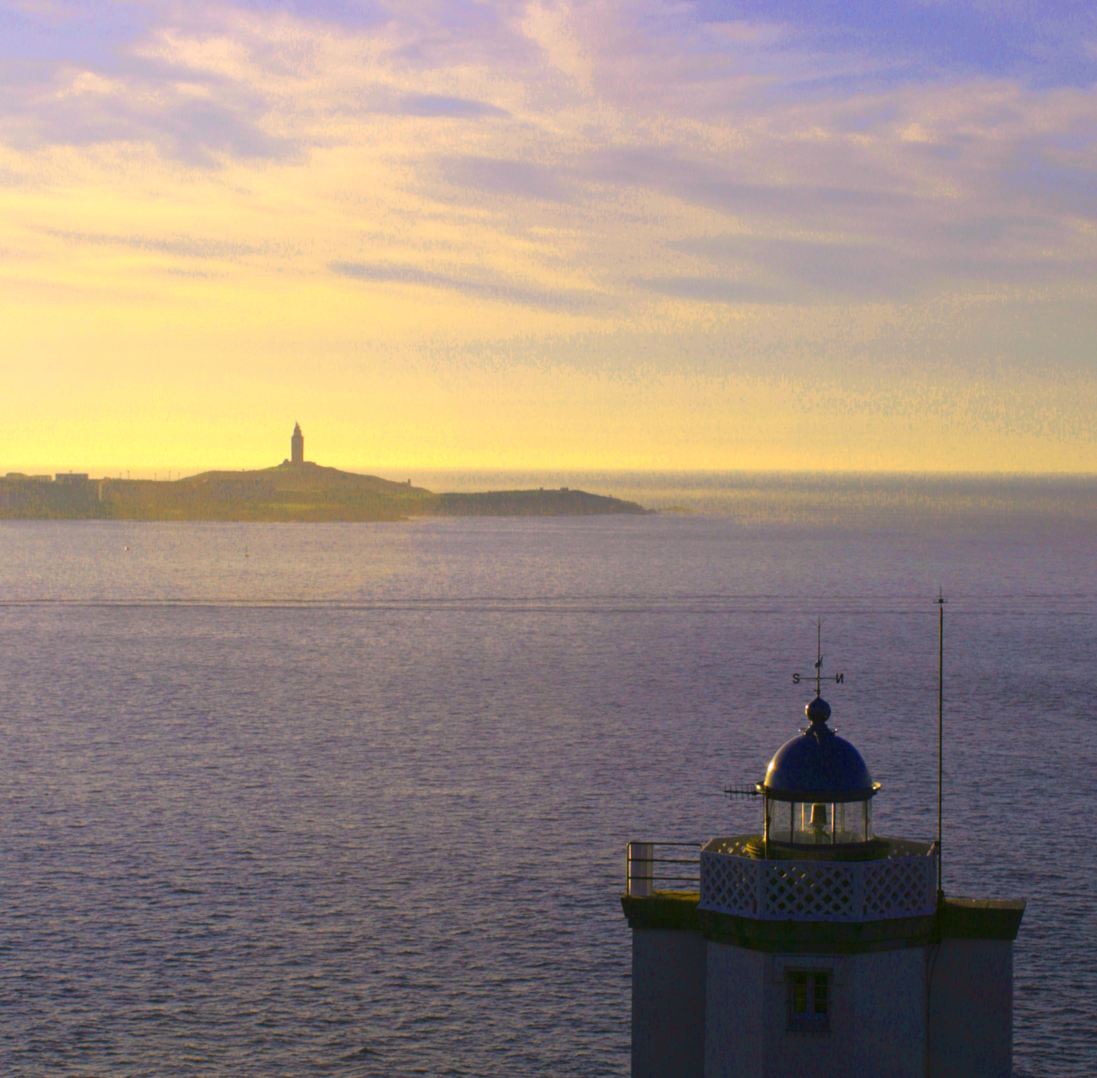 Dous faros. Un no este e outro no oeste. Un da Coruña e outro de Oleiros. Un a Torre de Hércules, Patrimonio da Humanidade, e outro o faro de Mera.